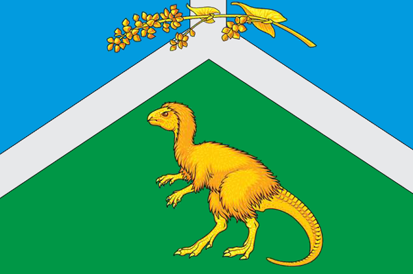 Флаг Чернышевского района Забайкальского края, Россия.